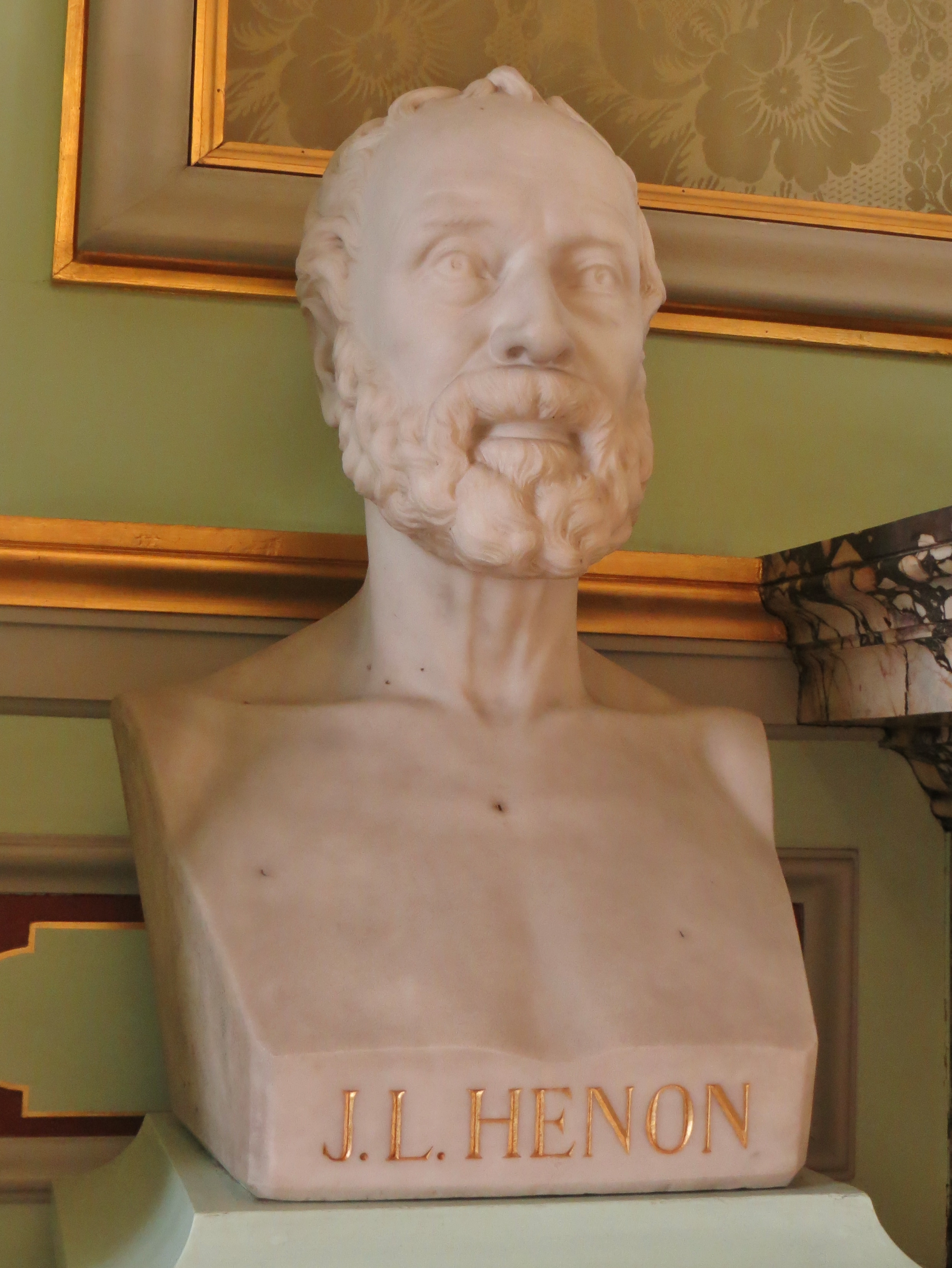 Buste en marbre de Jacques-Louis Hénon, ancien maire de Lyon